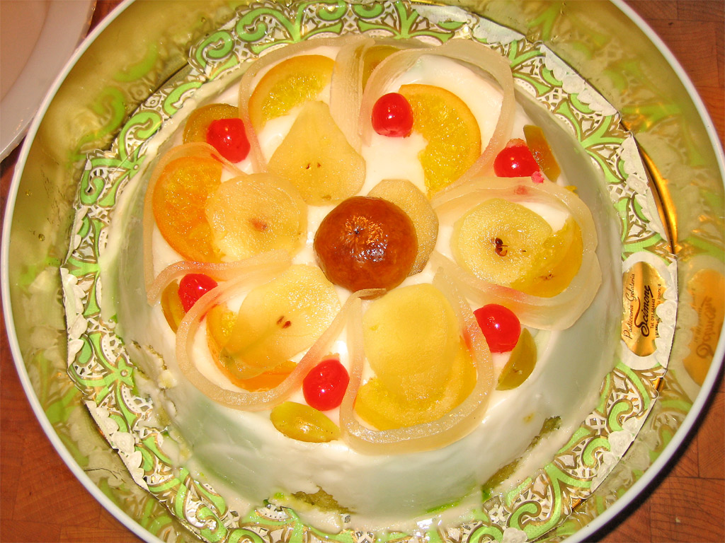 Cassata siciliana arrivata, in regalo, per corriere da Palermo Pasticceria Scimone eccola!